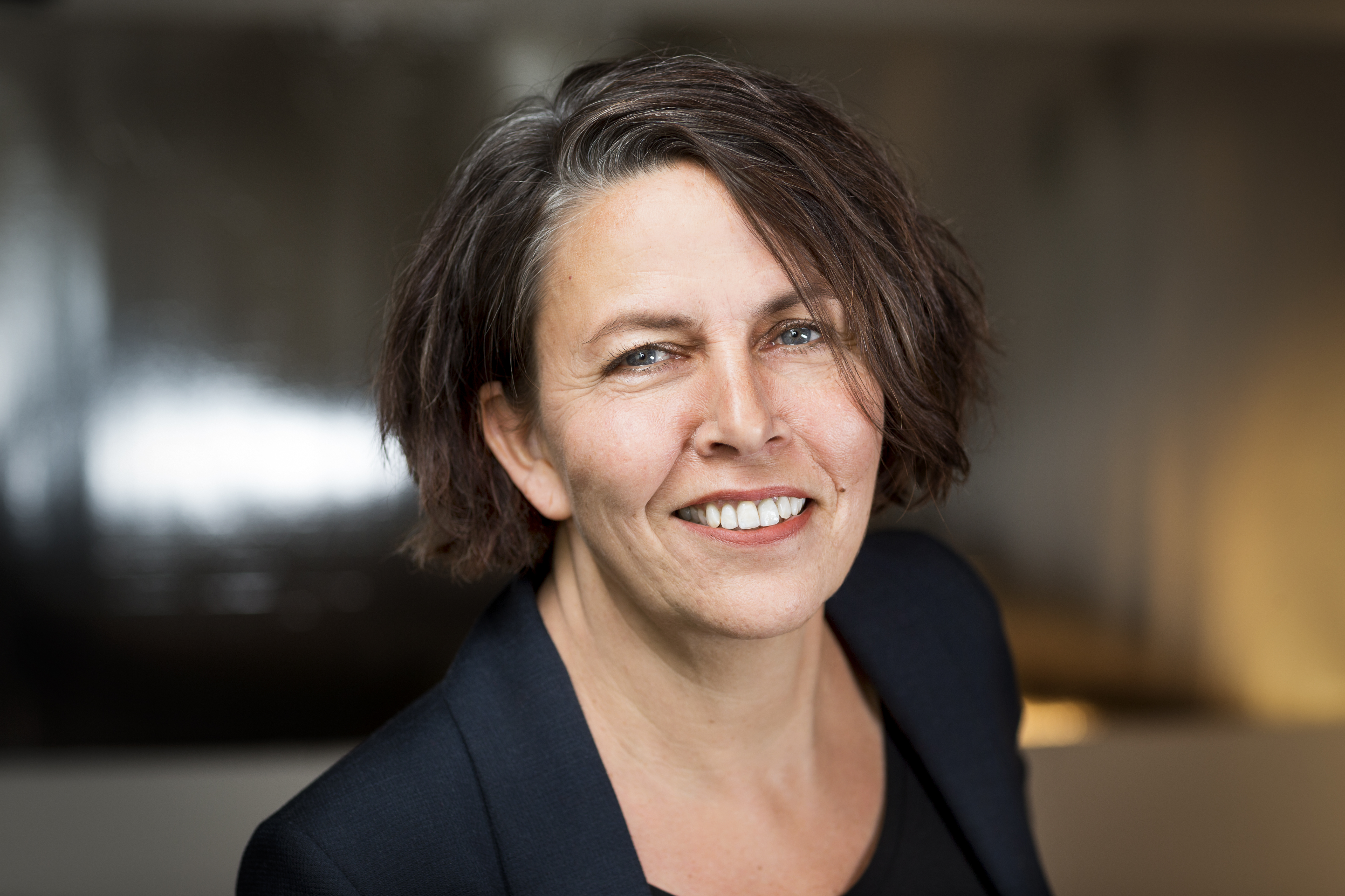 Direktør Henriette Laursen, Kvinfo